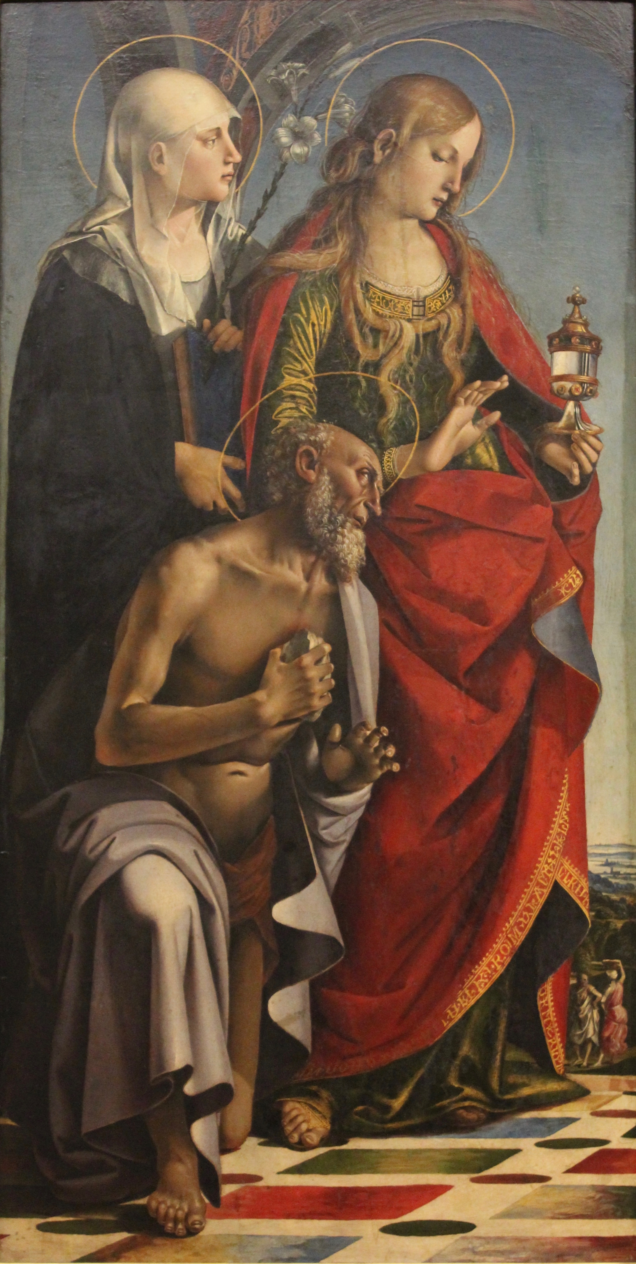 Im Gegensatz zum rechten Flügel sind die Heiligen hier parallel angeordnet, der hl. Hieronymus ist im Vordergrund links.